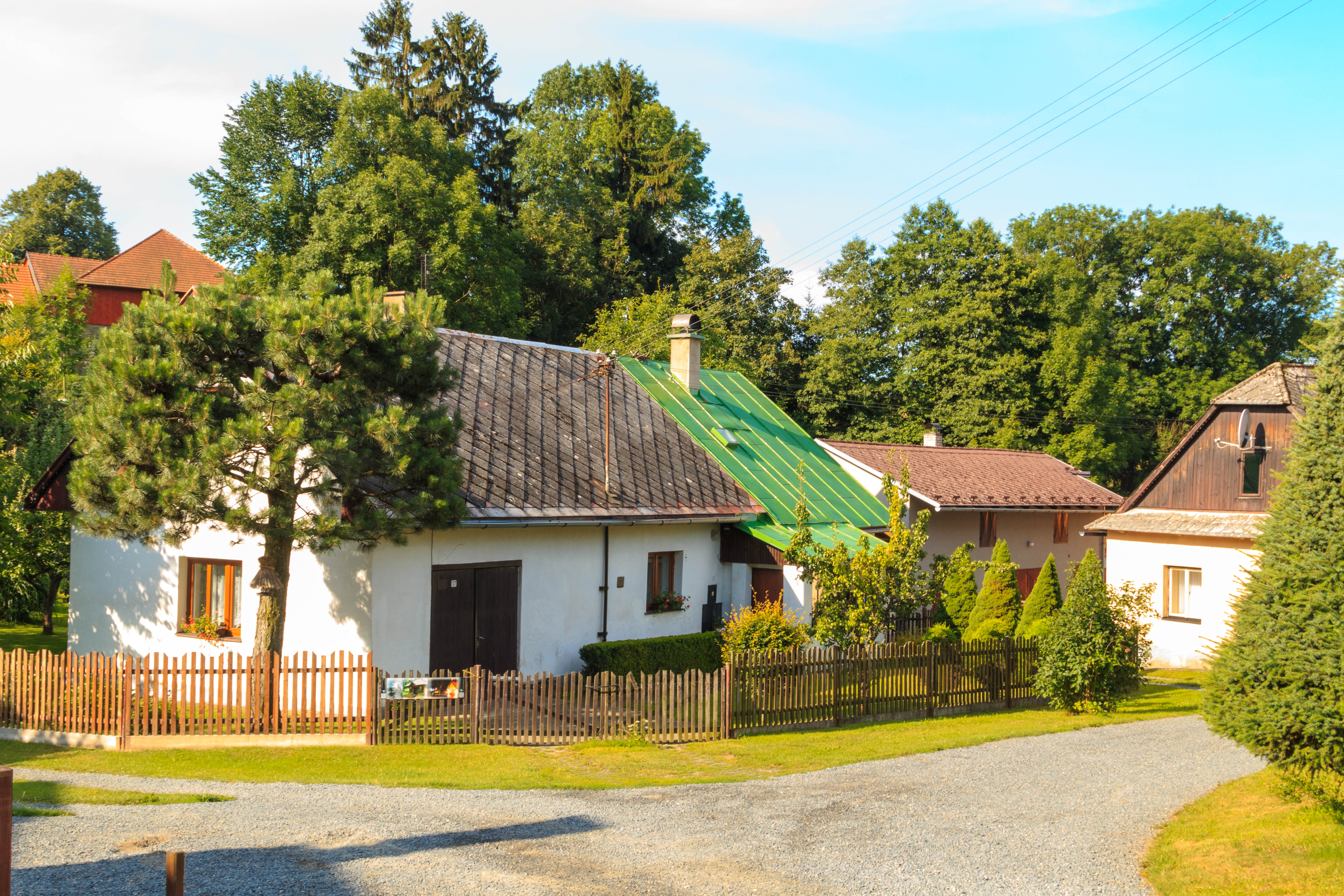 Kladruby u Libice nad Doubravou čp. 17